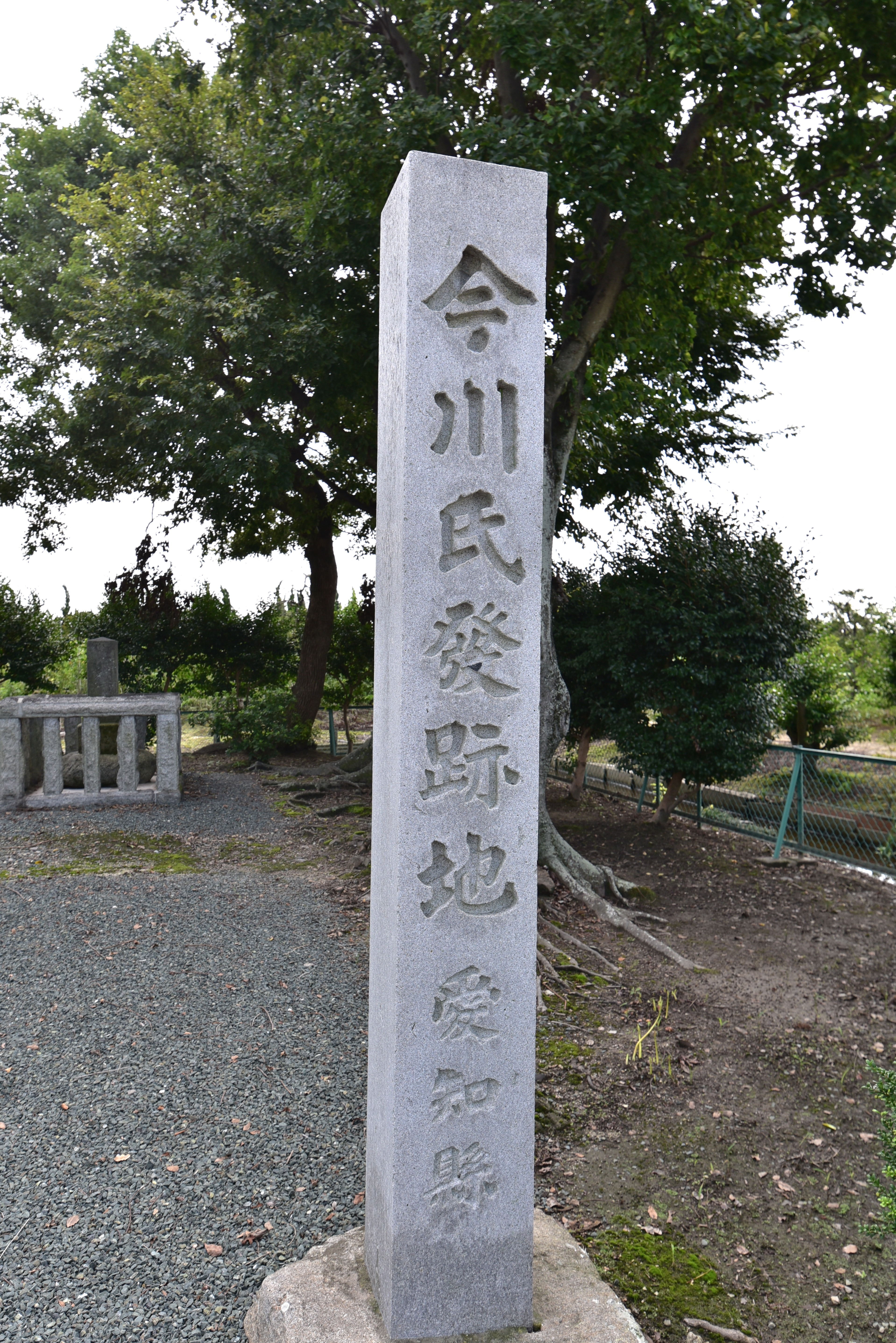 今川氏発祥地碑 Nikon D750